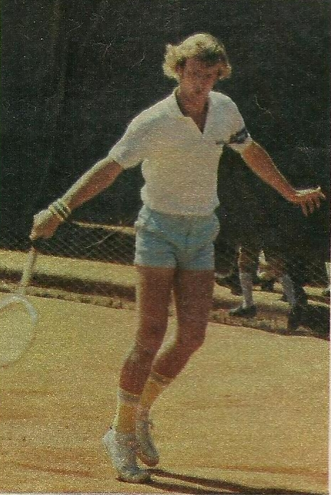 Eduardo Bengoechea, tenista activo en la década de 1980.